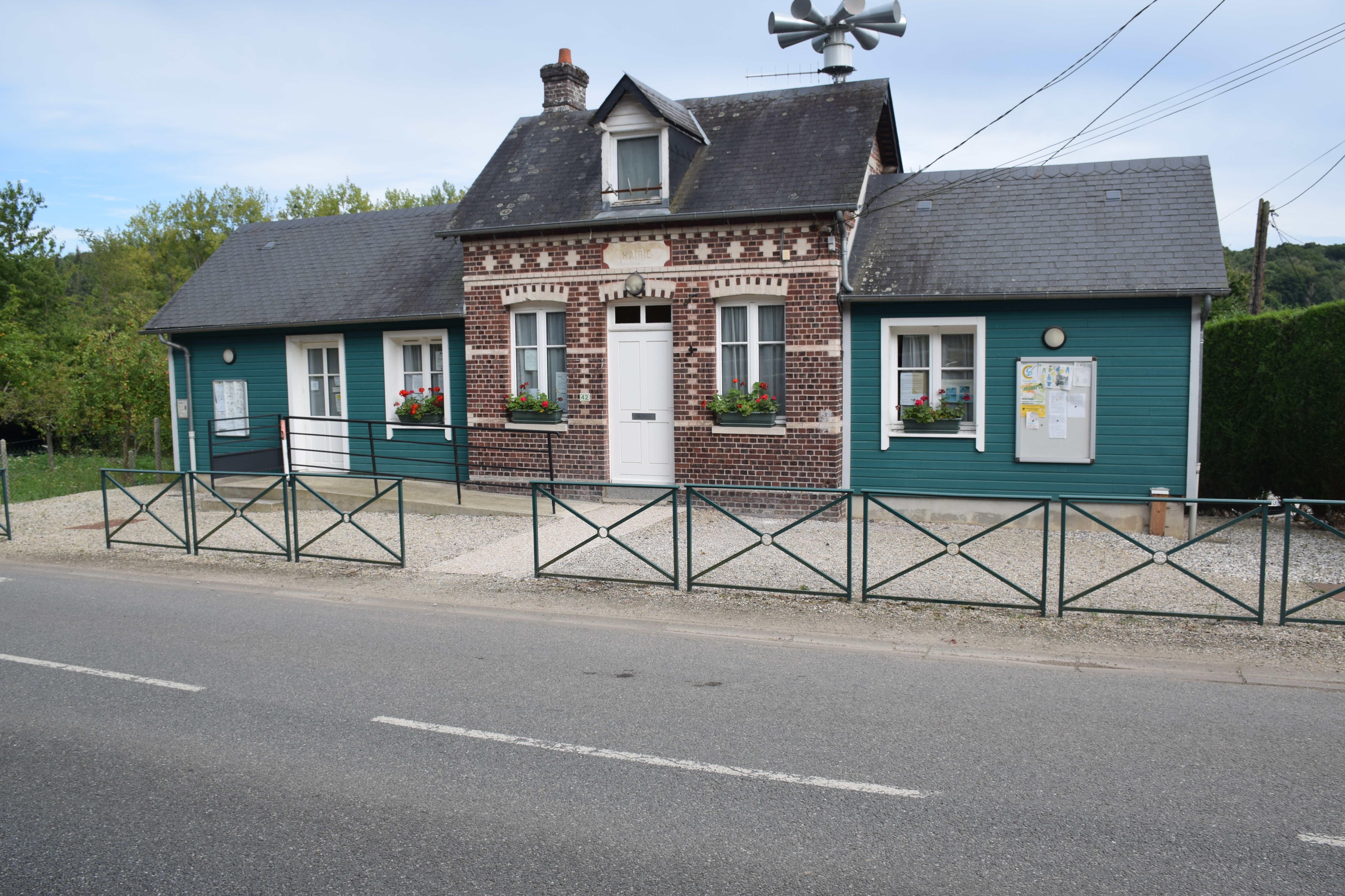 Mairie